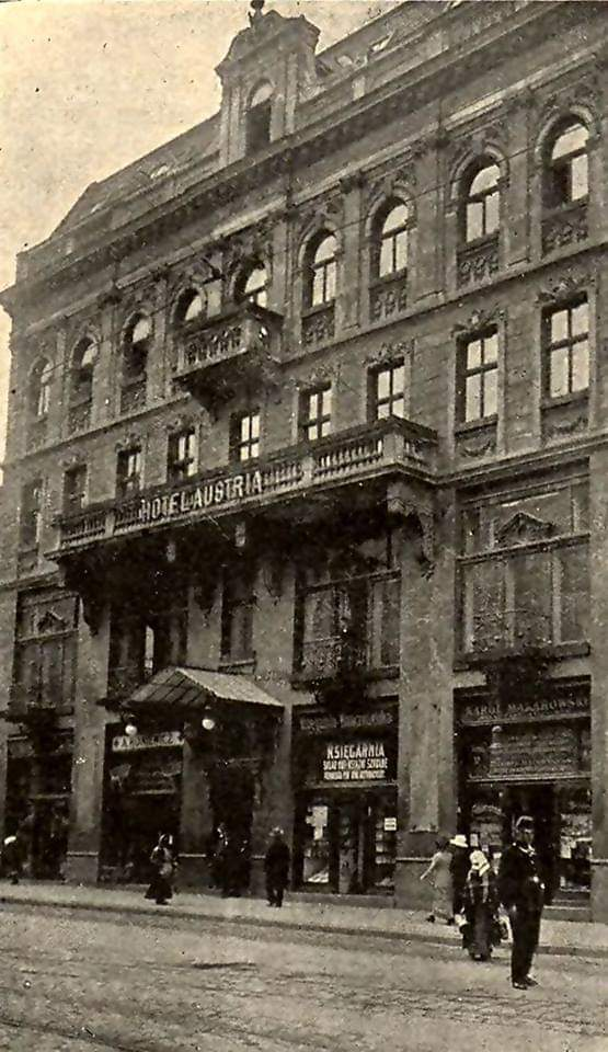 вулиця Князя Романа 12